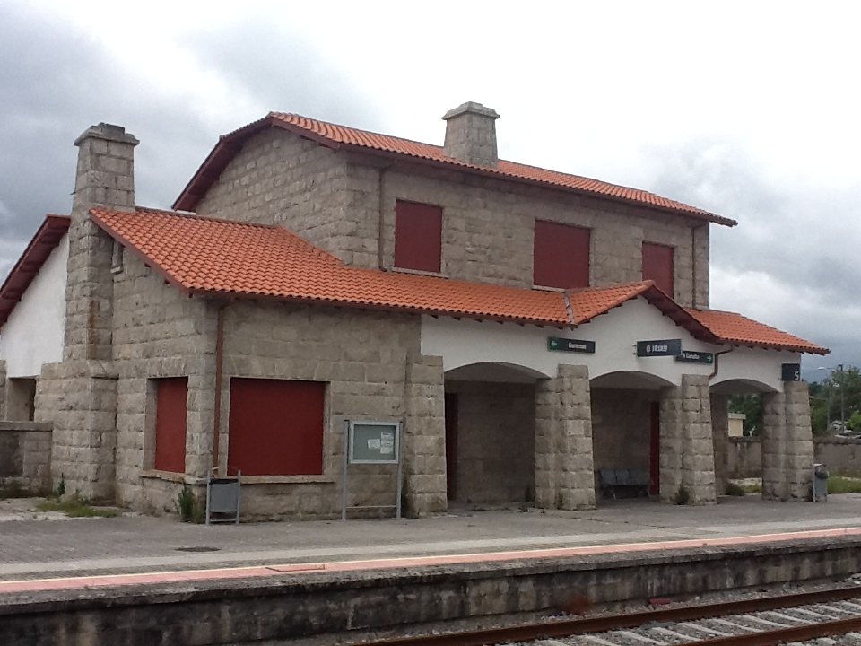 Plataforma da estación do Irixo